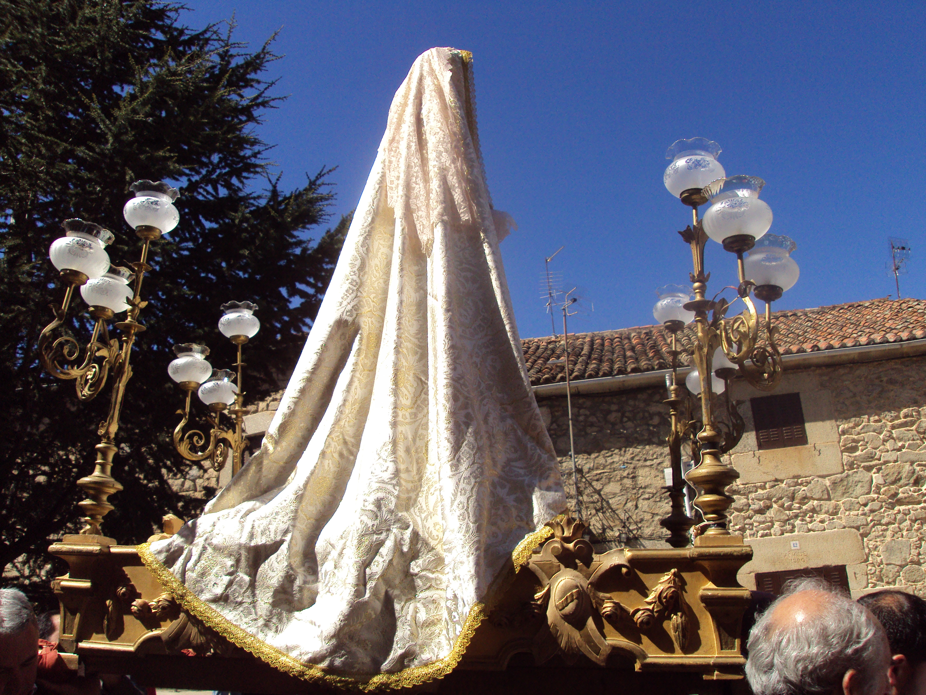 Procesión del Domingo de Resurrección (Villafranca de la Sierra; España)